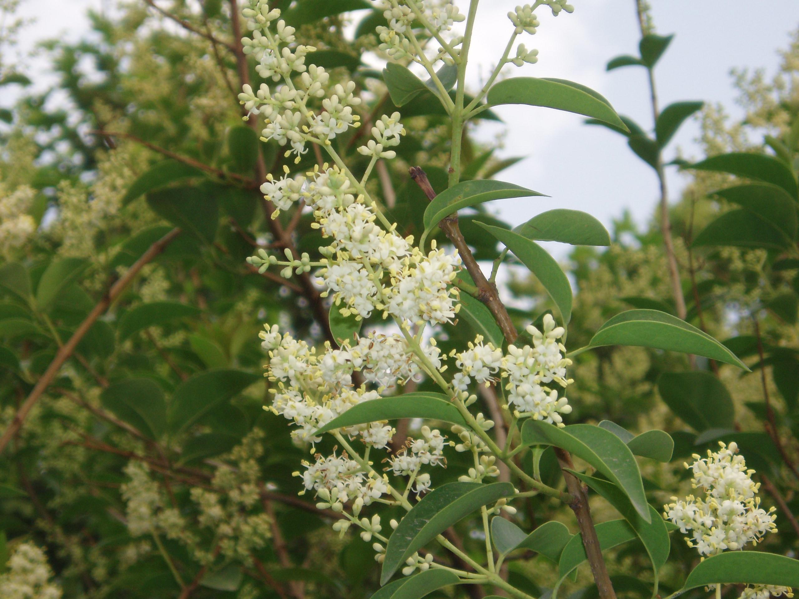 Ligustrum lucidum flowers